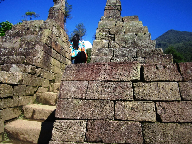 Prasasti pada salah satu gapura menuju teras ke-7 Candi Ceto. Aksara Jawa Kuna. Alih aksara (menurut papan informasi di lokasi candi): pelling padamel irikang buku tirtasunya hawakira ya hilang saka kalanya wiku goh anaut iku. 1397 (Saka) [atau 1475 M].